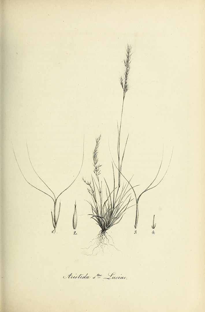 Aristida sanctae-luciae Trin.